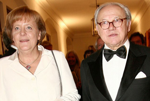 Angela Merkel und Hubert Burda in der Residenz in München anlässlich Dr. Burdas 70. Geburtstag